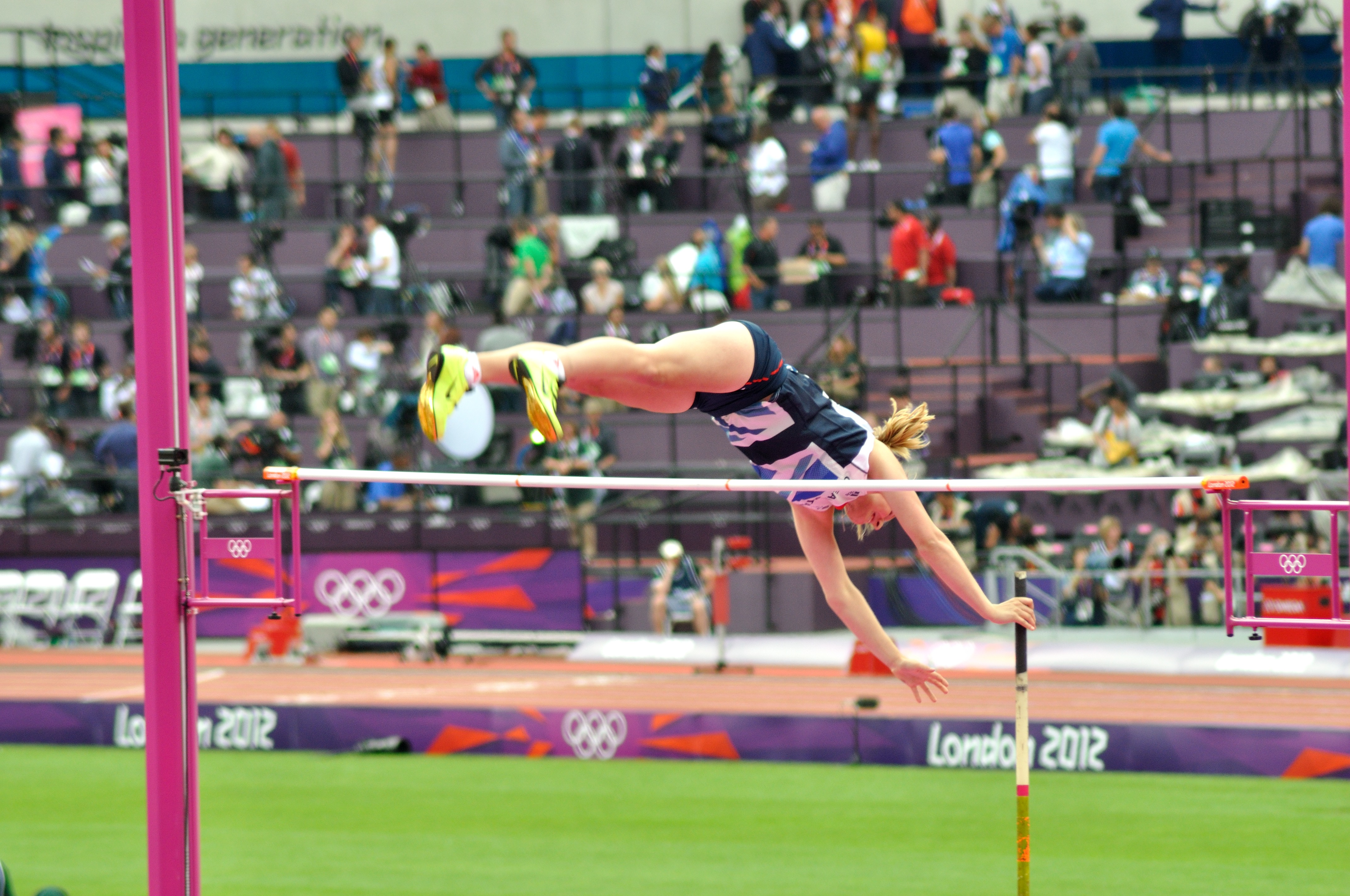 London 2012